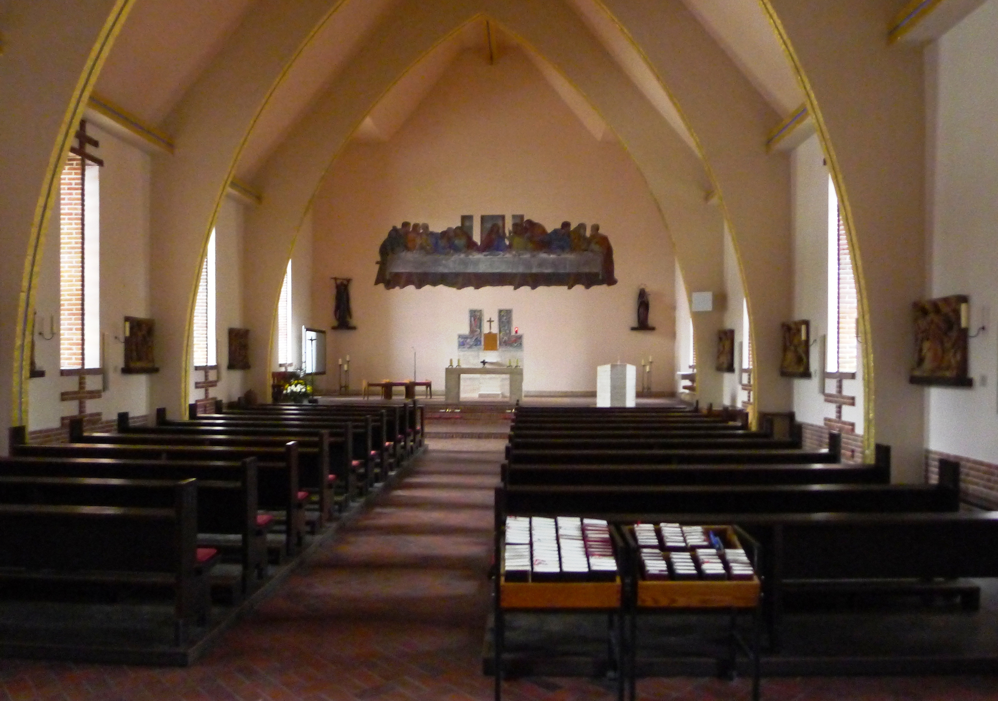 Blick in den Kirchraum Richtung Altar